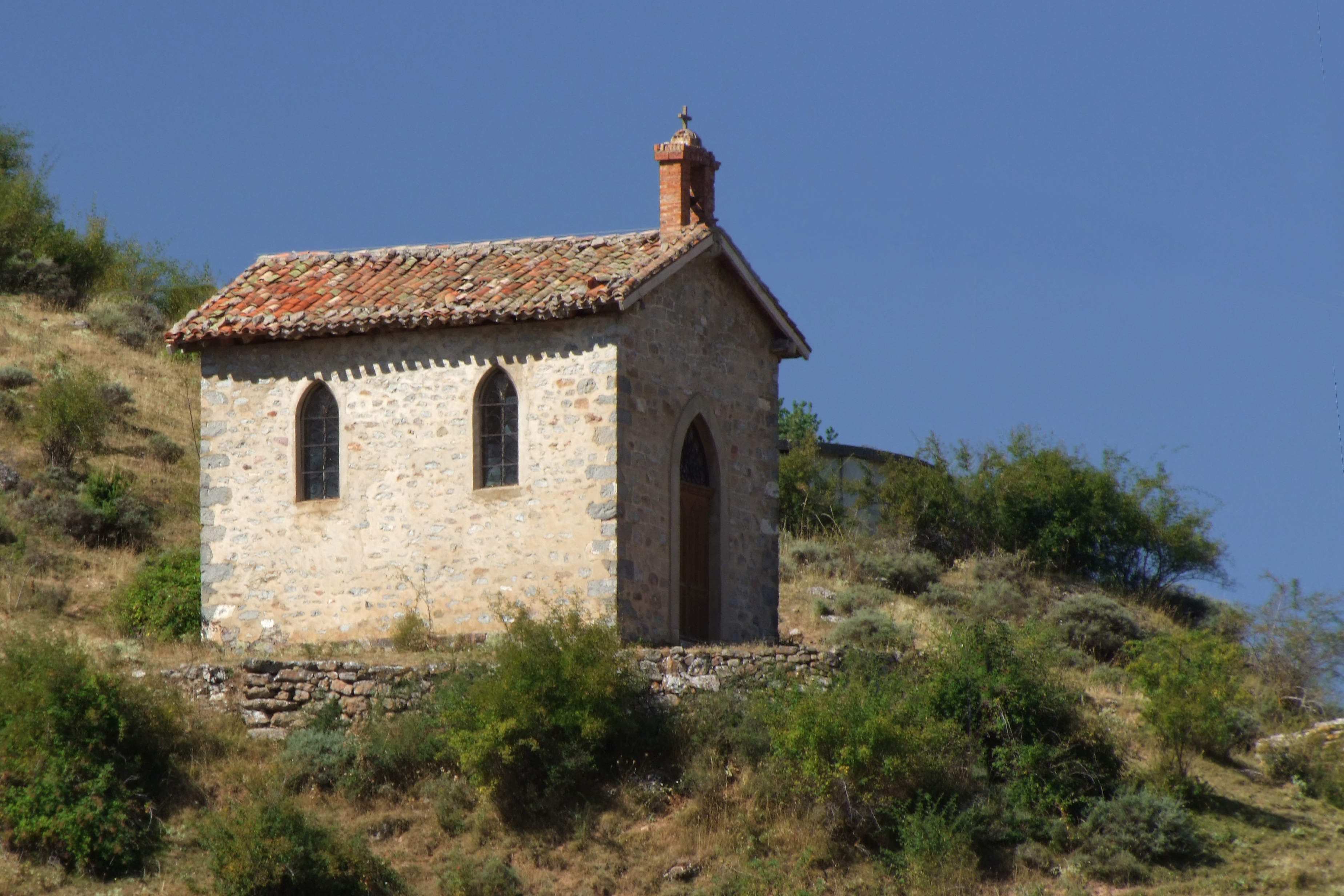 Ermita de San Felices en la localidad de Ortigosa de Cameros, La Rioja - España